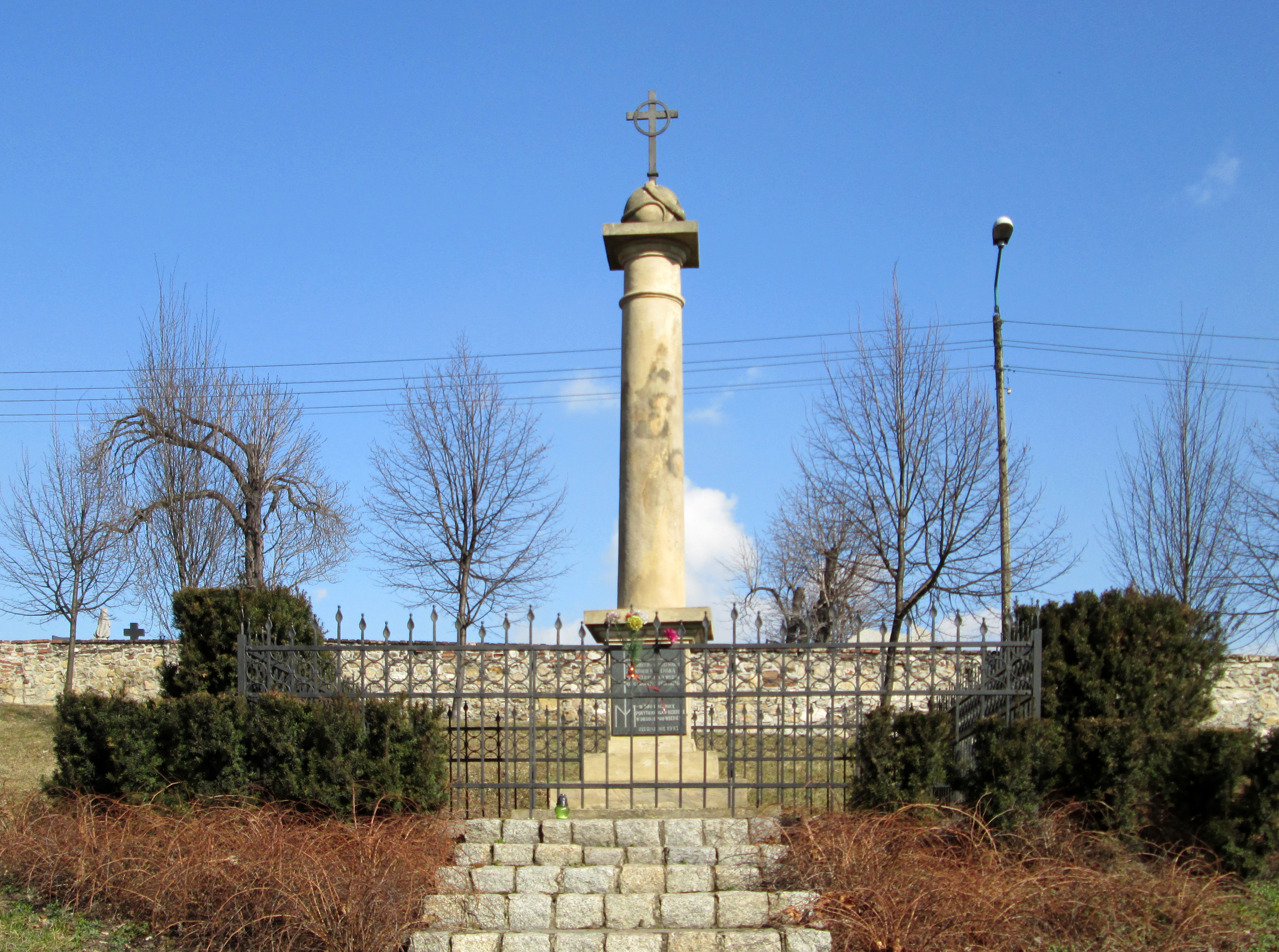 Pomnik upamiętniający przemarsz wojsk Jana III Sobieskiego, na odsiecz Wiedniowi w 1683r. Ustawiony prawdopodobnie w 1833. Wpisany do rejestru zabytków ruchomych województwa śląskiego pod nr B 25/01 z 17 XI 2001